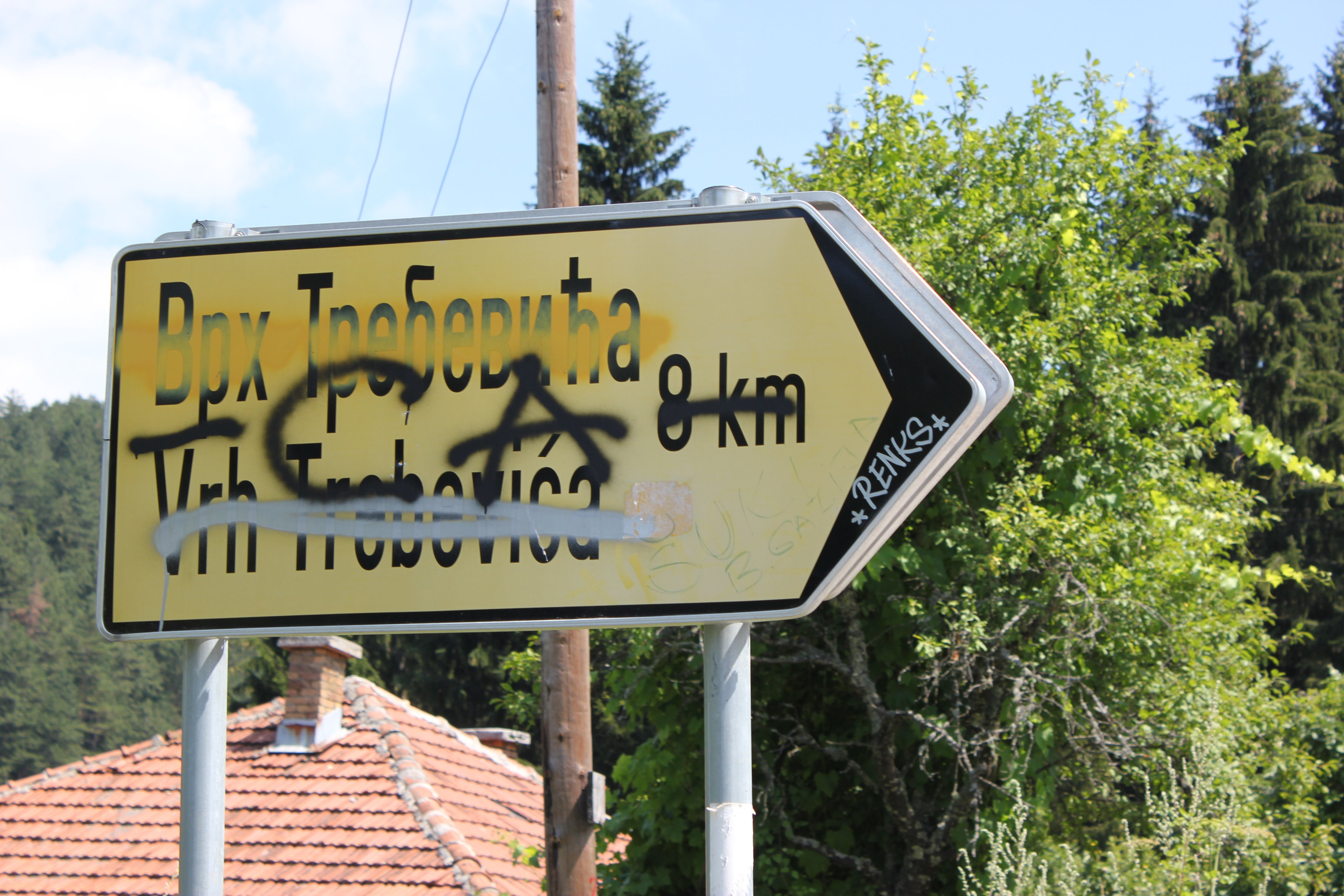 Zweifach übersprühtes kyrillisch-lateinisches Hinweisschild am Trebević oberhalb von Sarajevo.